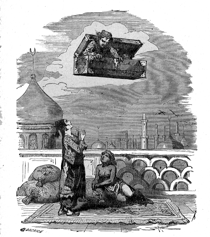 Pour la source voir : Discuter:Contes d'Andersen Vignette de Le Coffre volant) par Bertall représentant le coffre volant.